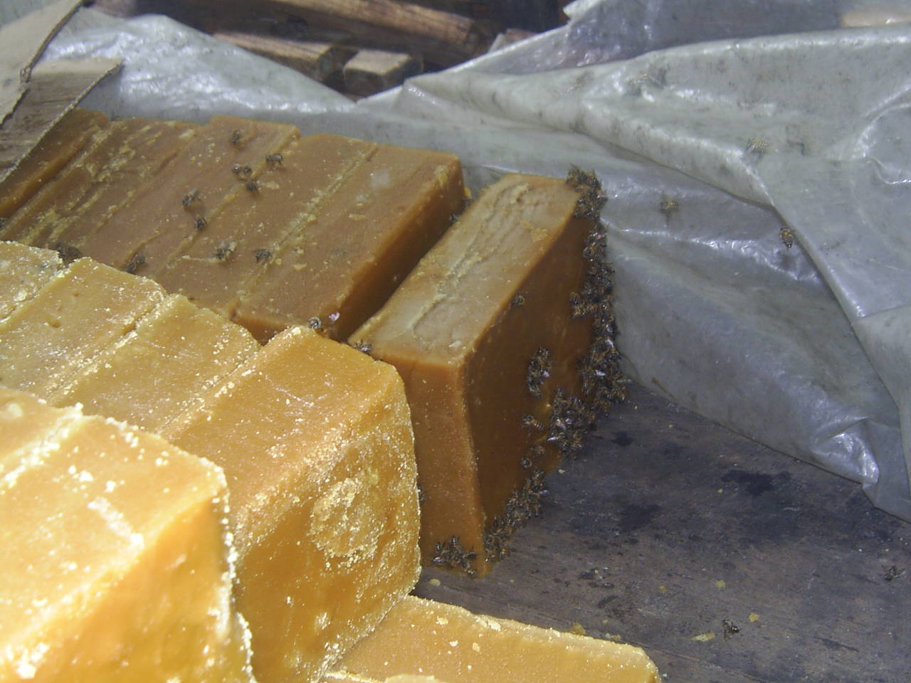 Detalle de panelas apiladas